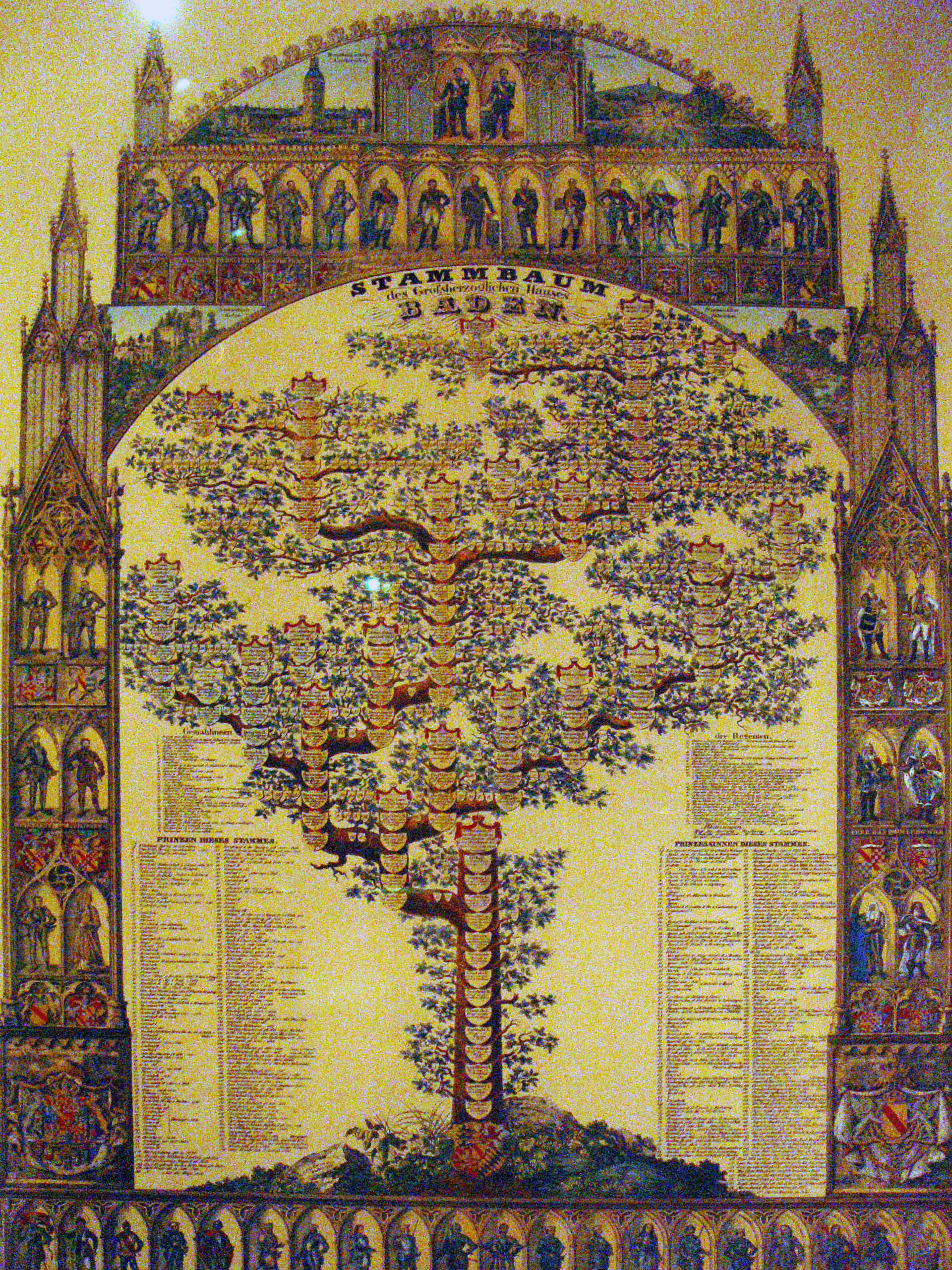 Stammbaum des Adelsgeschlechts von Baden.